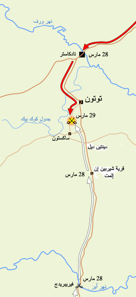 تقدم جيش يورك وجيش لانكاستر نحو مدينة توتون احدى معارك حرب الوردتين